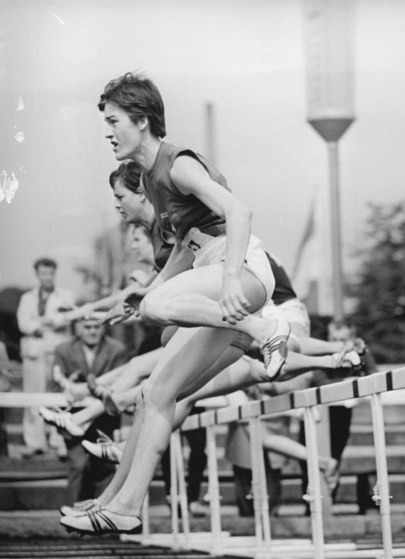 Karin Balzer Zentralbild Kohls 31.8.1963 XIV. Deutsche Leichtathletik-Meisterschaften in Jena vom (30.8.-1.9.1963) UBz: Mit dem 80-m-Hürdenlauf der Frauen wurden die Meisterschaften eröffnet. Titelverteidigerin Karin Balzer (SC Frankfurt) erzielte mit 10,9 sek. die beste Vorlaufzeit.